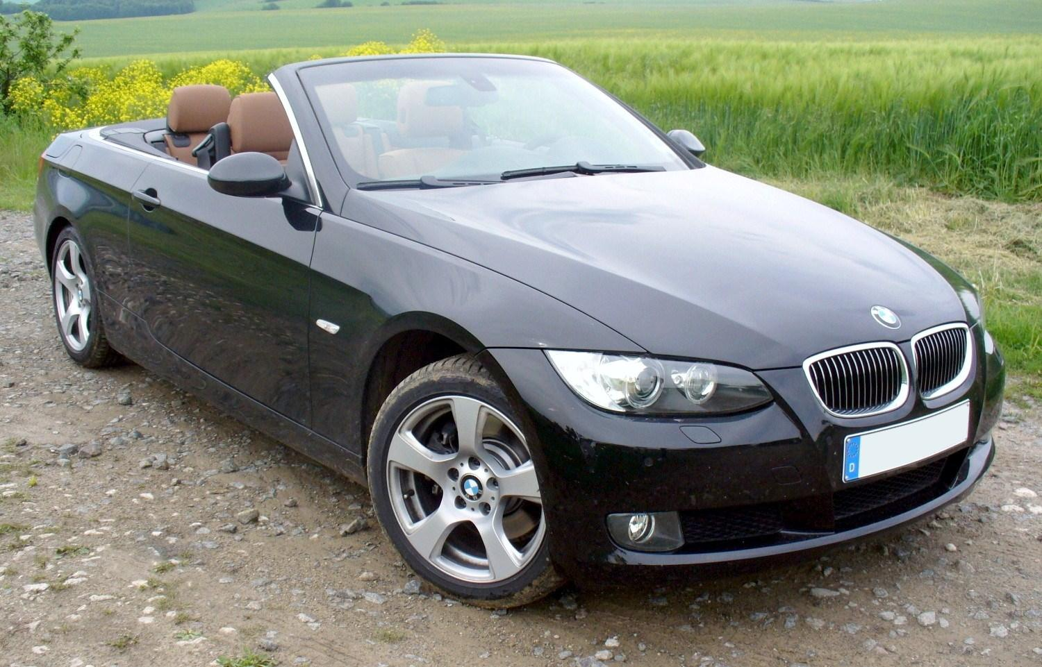 BMW E93 325i